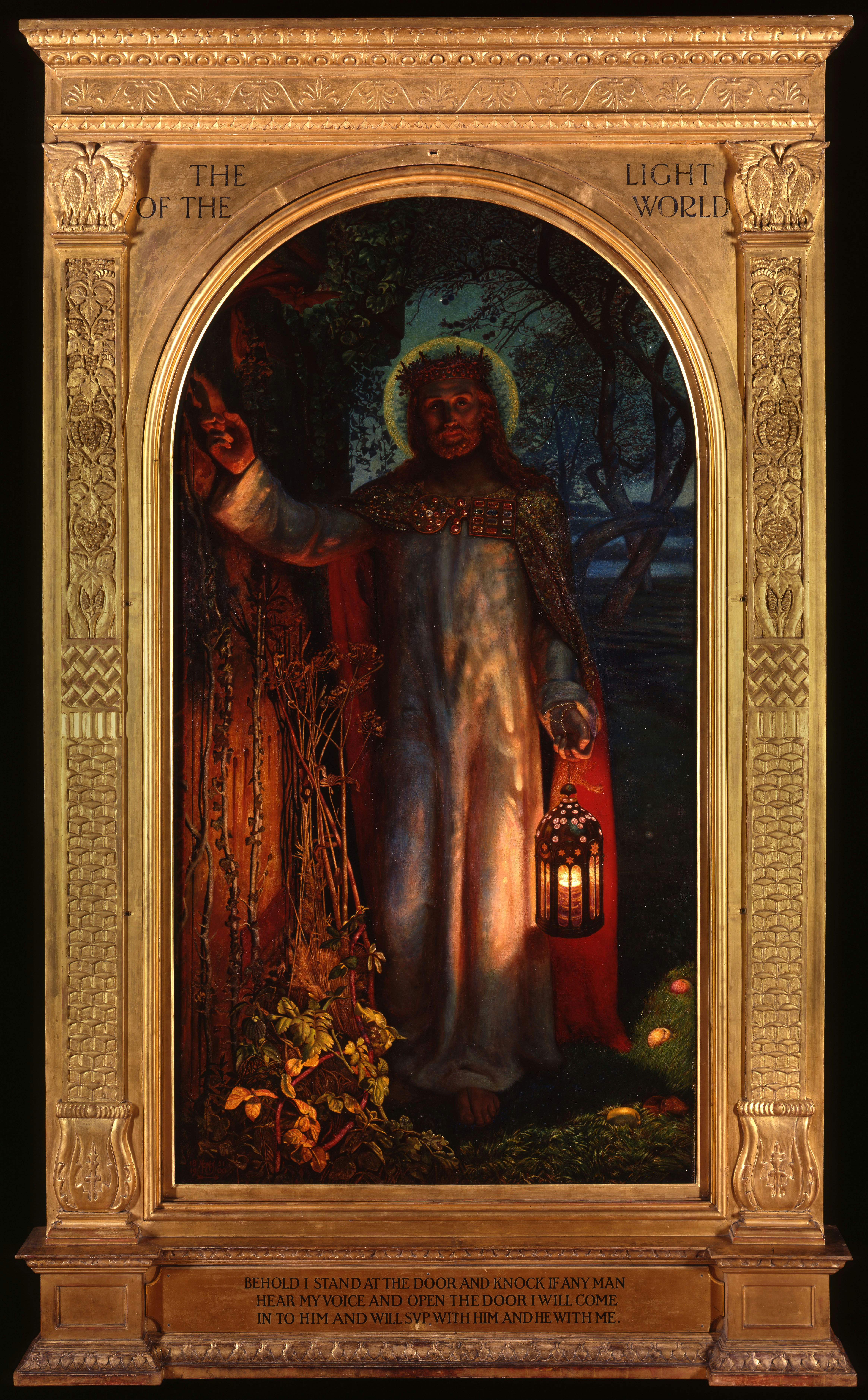 Tableau qui représente Jésus toquant à une porte et qui apporte la lumière au monde.